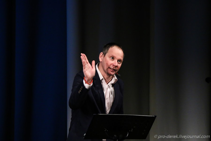 Заслуженный артист России Даниил Спиваковский. Выступление в тольяттинской филармонии в сопровождении ансамбля русских народных инструментов "Русская рапсодия".Тольятти, 2015 год